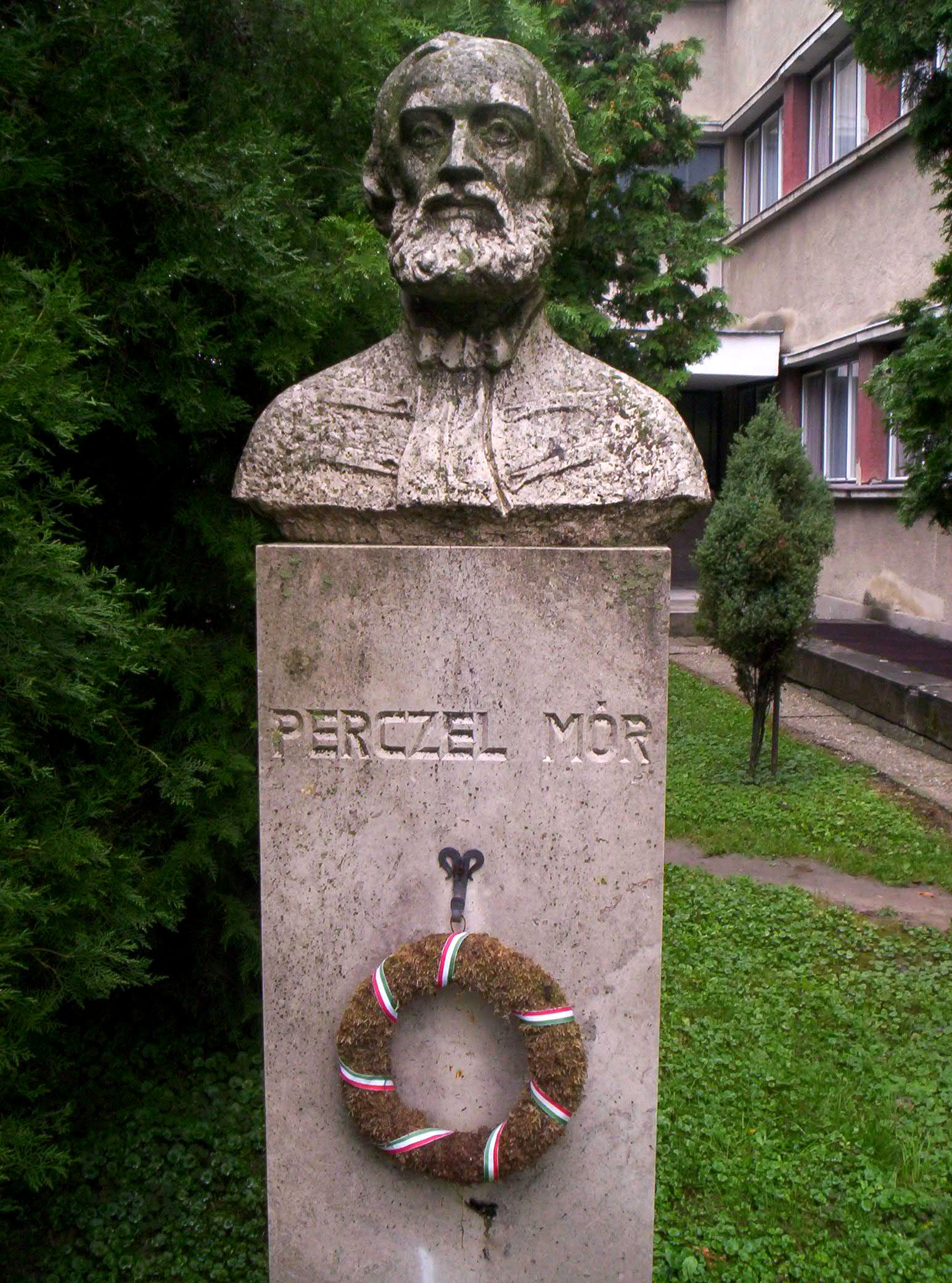 Perczel Mór szobra (Szabó György, 1979) - Bonyhád, Széchenyi tér/Statue of hungarian general in Bonyhád (Szabó György alkotása) – photo taken by the uploader 2005